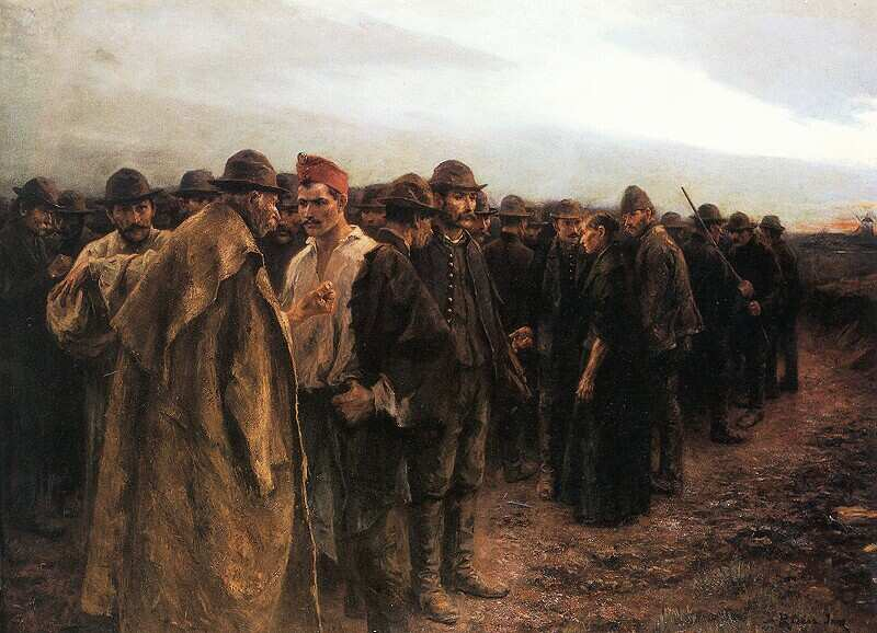 Révész Imre. "Panem!" - olajfestmйny, 1899 Magyar Kцnyvklub, Budapest